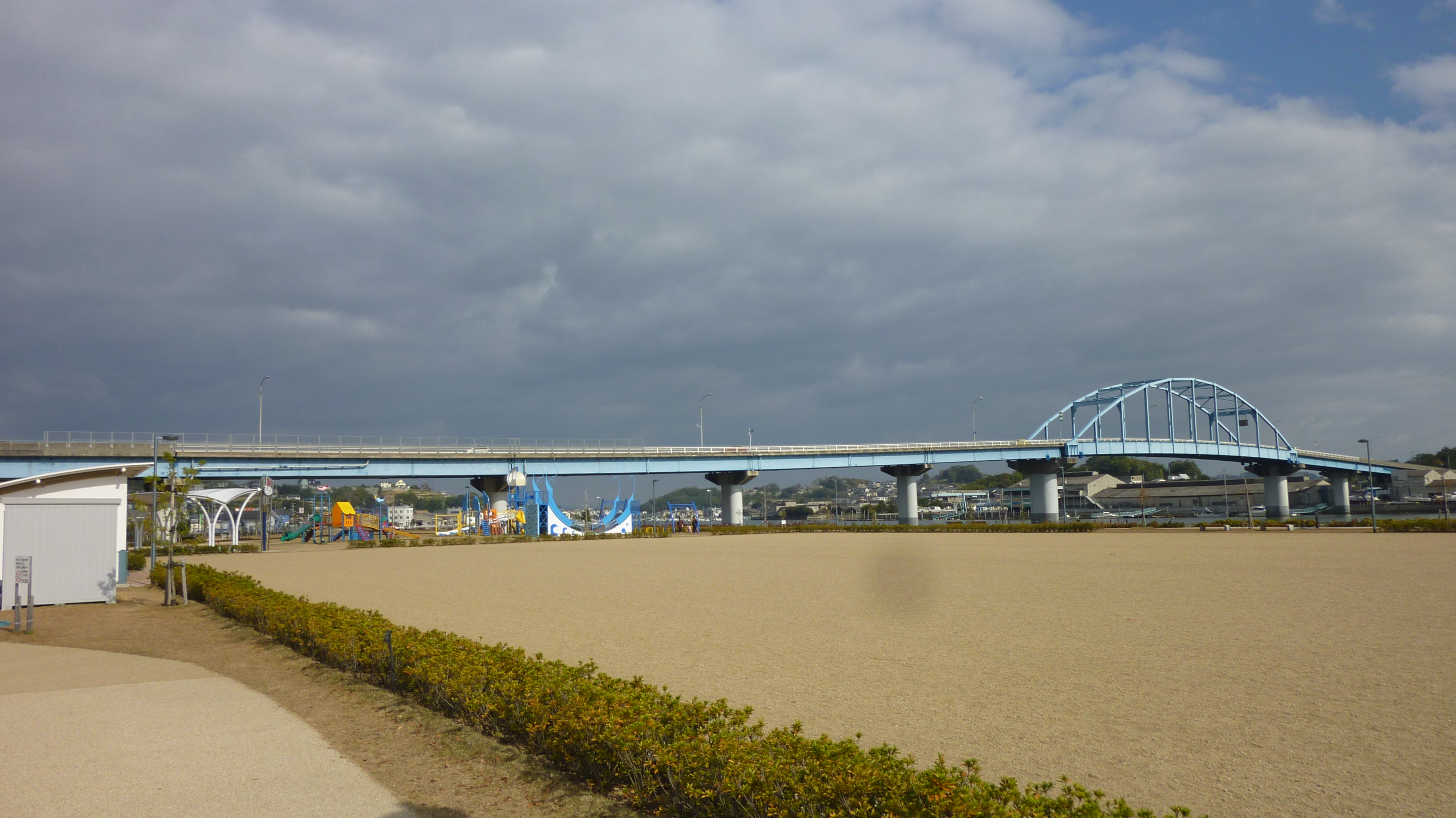 岡山県倉敷市に架かる玉島大橋を、玉島みなと公園から撮影